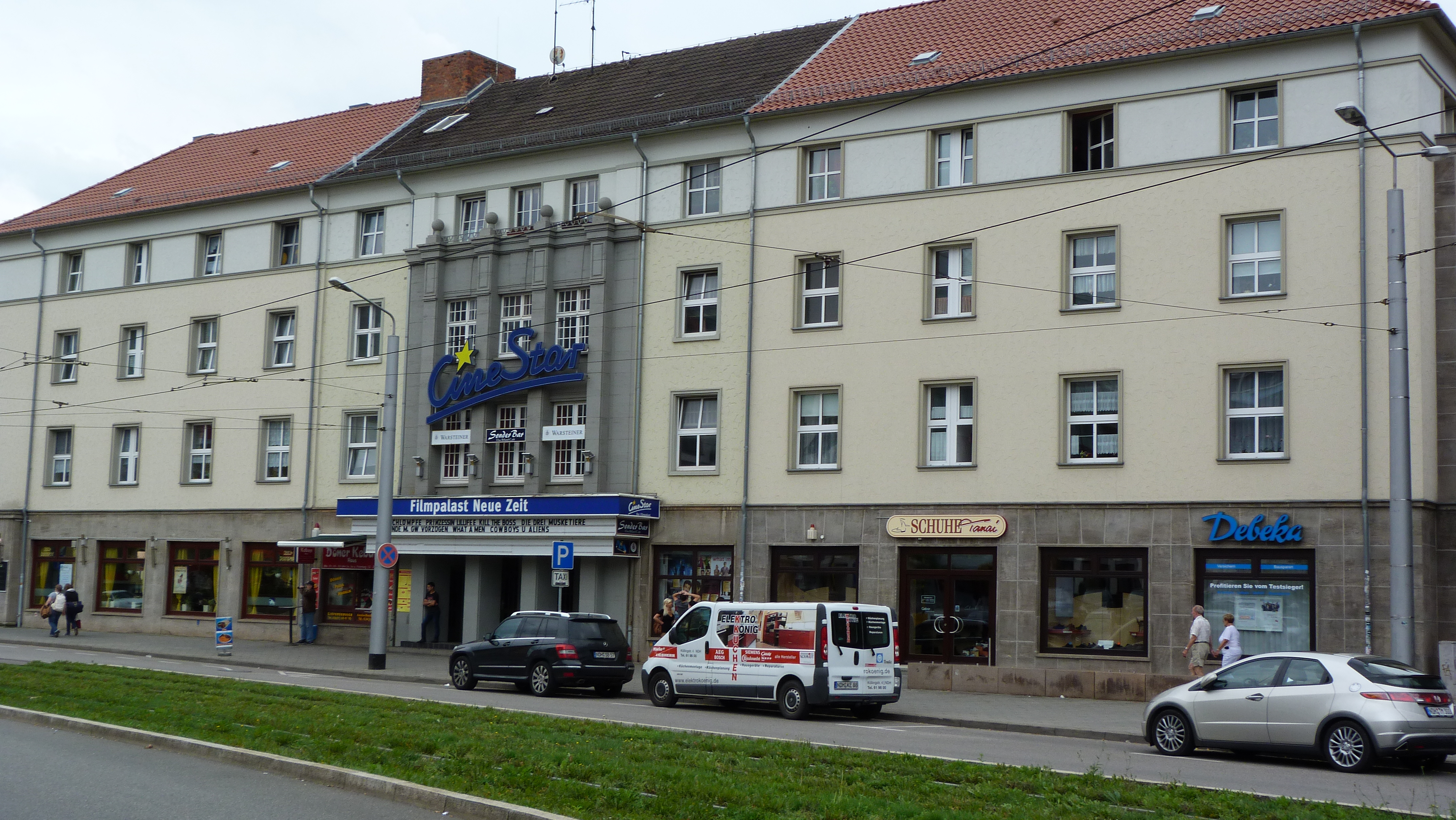 99734 Nordhausen, Thür., Erstes nach dem 2.Weltkrieg in der DDR gebautes Kino. Heute sind vier Kinosäle mit verschiedenen Größen Vorhanden. Filmpalast Neue Zeit